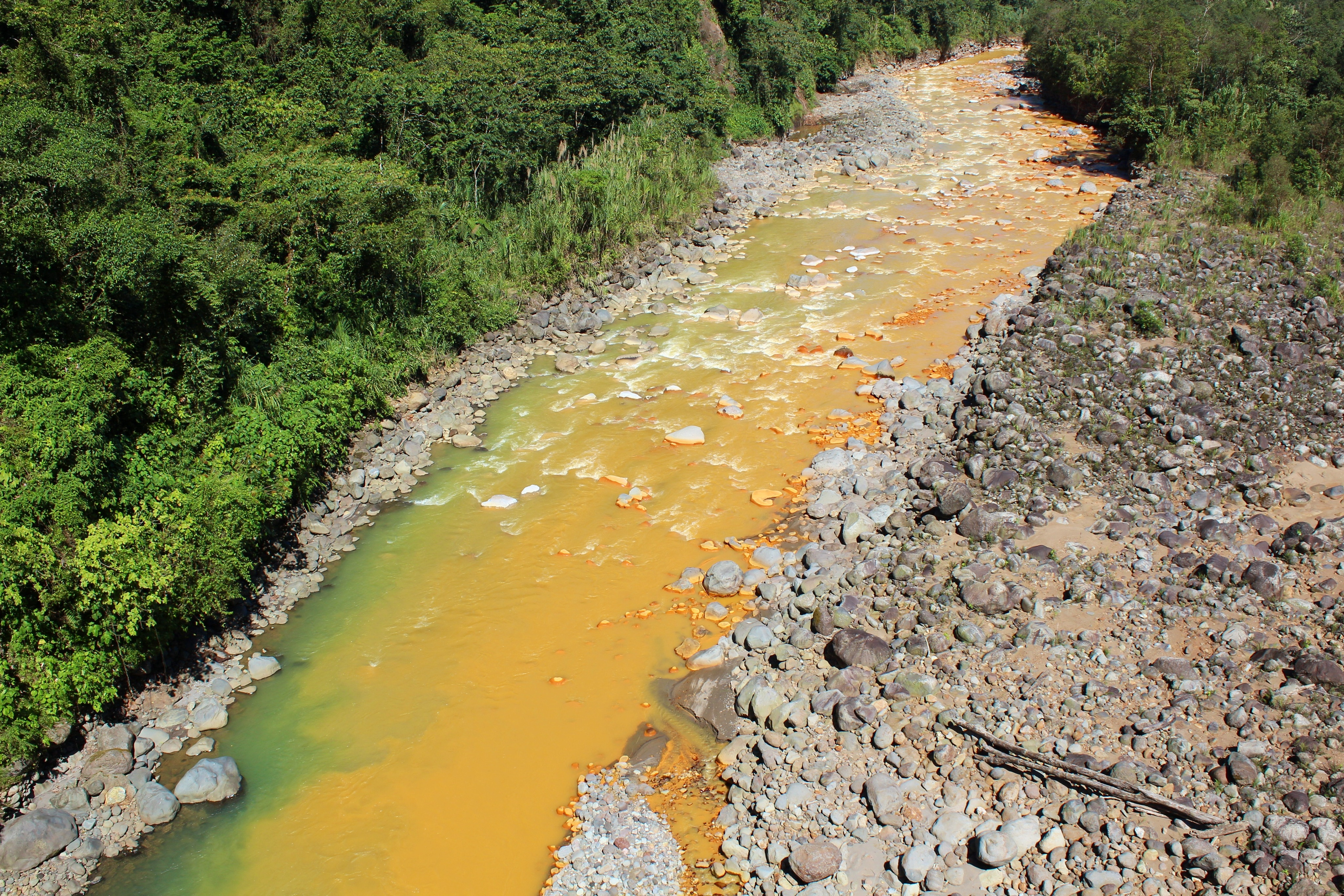 El río Sucio a su paso por el parque nacional Braulio Carrillo. Lleva su nombre por el color que toman sus aguas debido a la gran cantidad de material y sedimento que arrastra, proveniente de la cordillera volcánica Central.